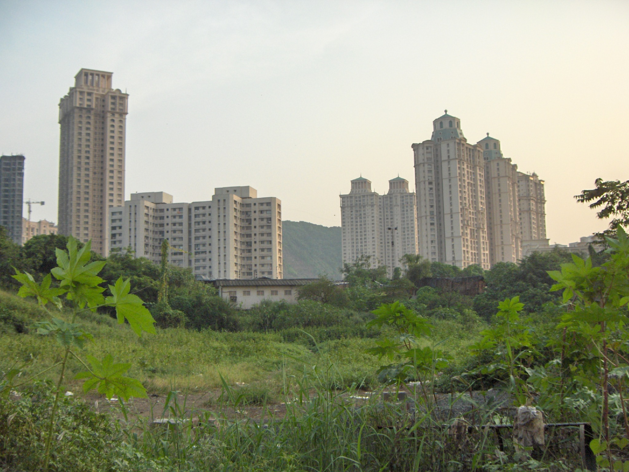 Hiranandani Gardens in Powai, Mumbai, India